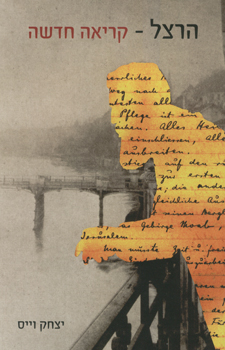 כריכת הספר הרצל קריאה חדשה